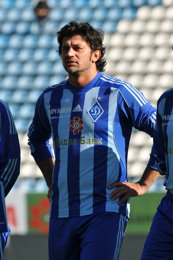 Каха Каладзе на Матчі пам'яті Белькевича, Баля і Гусіна